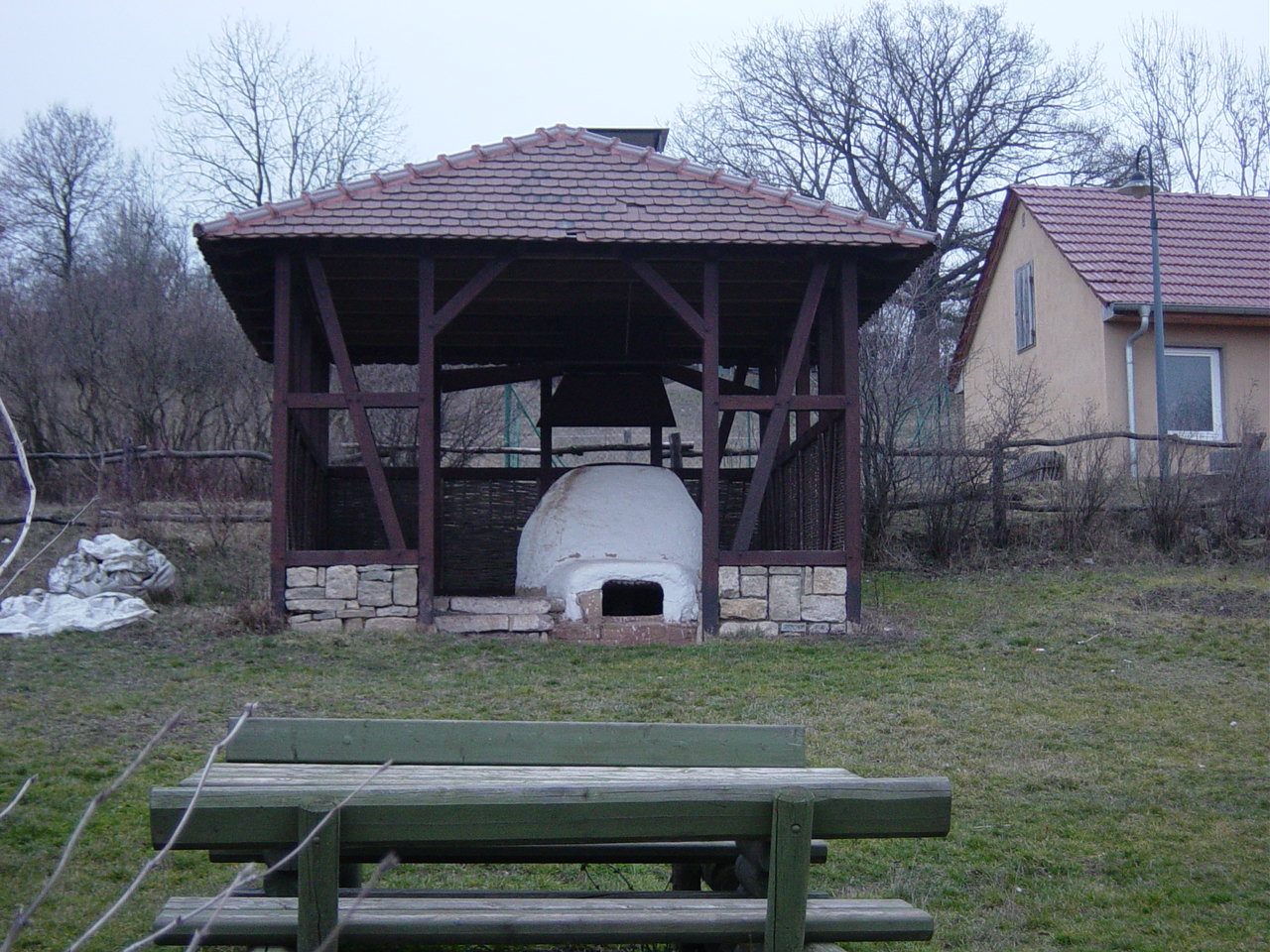 Nachbildung eines Römischen Töpferofens auf dem Gelände für experimentelle Archäologie in Haarhausen (Wachsenburggemeinde)